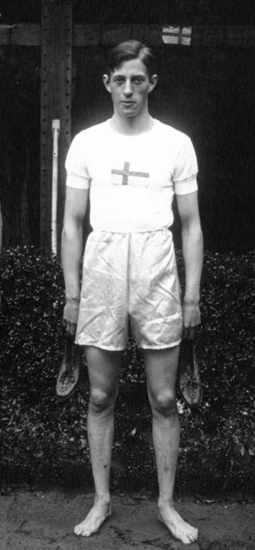 VIIes Olympiades à Anvers : équipe suédoise gagnante du saut en longueur : Rolf Franksson : [photographie de presse] / Agence Meurisse